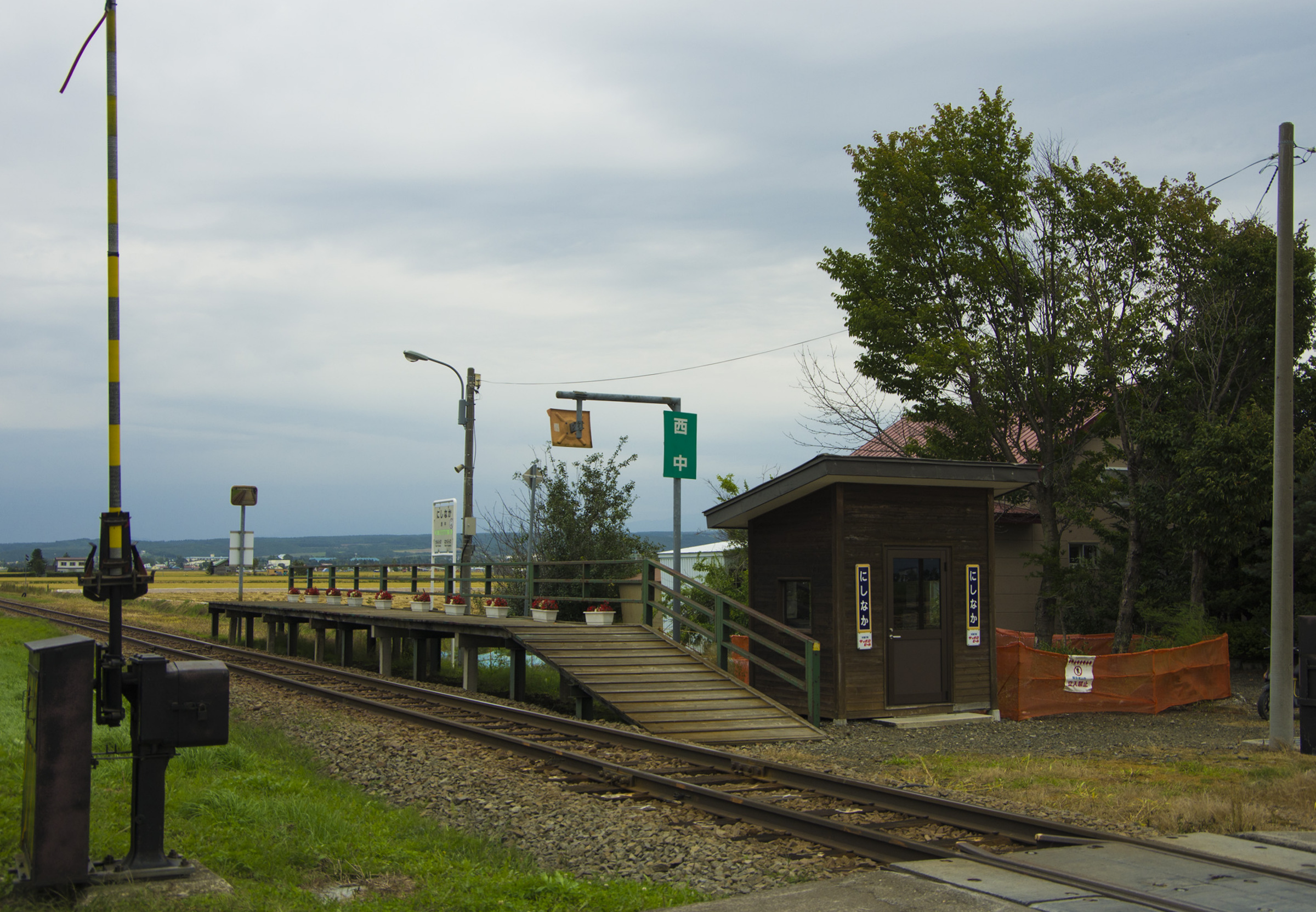 北海道旅客鉄道富良野線西中駅